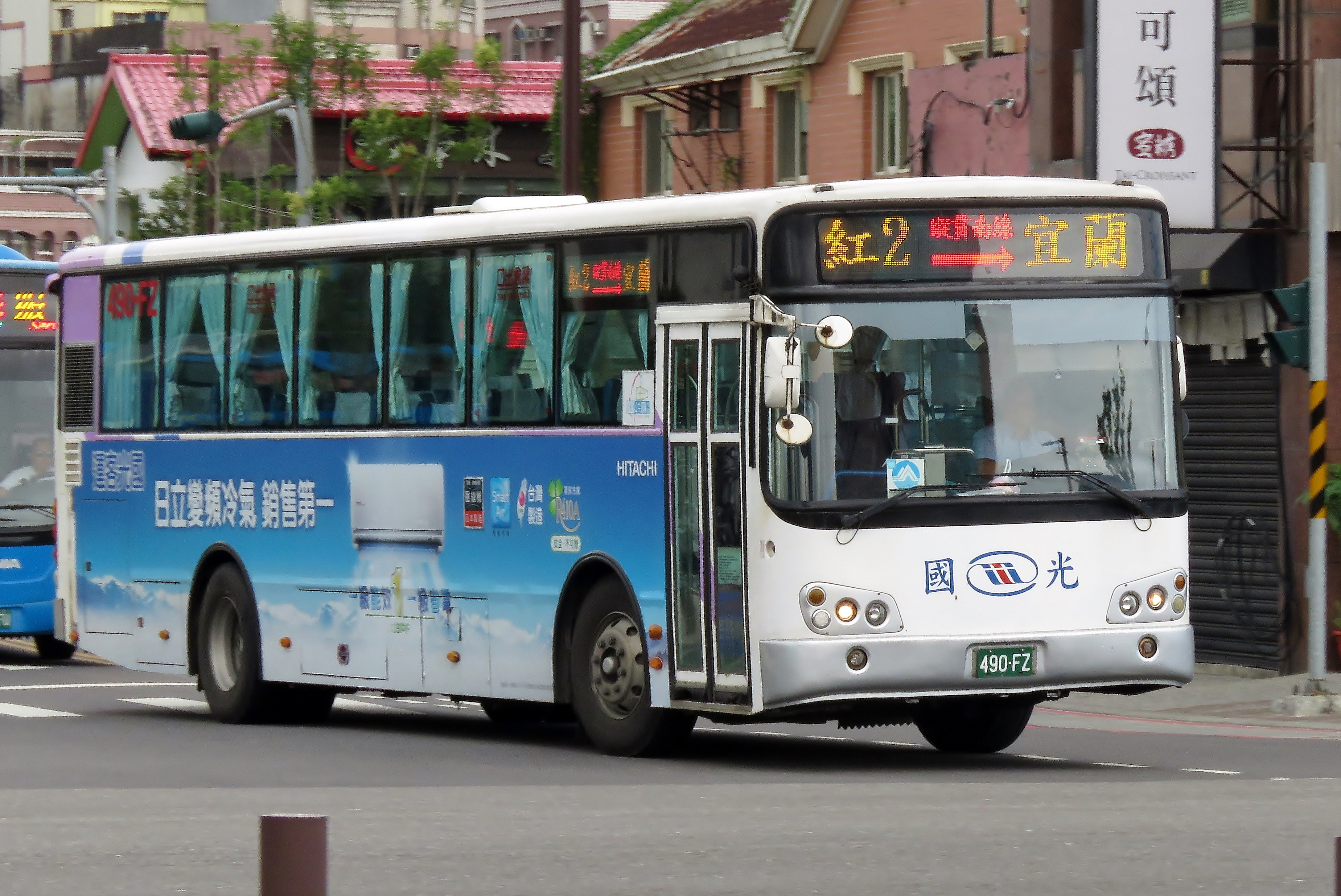 2012 Daewoo BC211MA 紅2路 南方澳→宜蘭